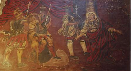 Pintura parietal de la Capilla de Santa Generosa en la iglesia arciprestal de San Pedro y San Pablo de Ademuz (Valencia, España). Representa a la santa ante el cónsul.